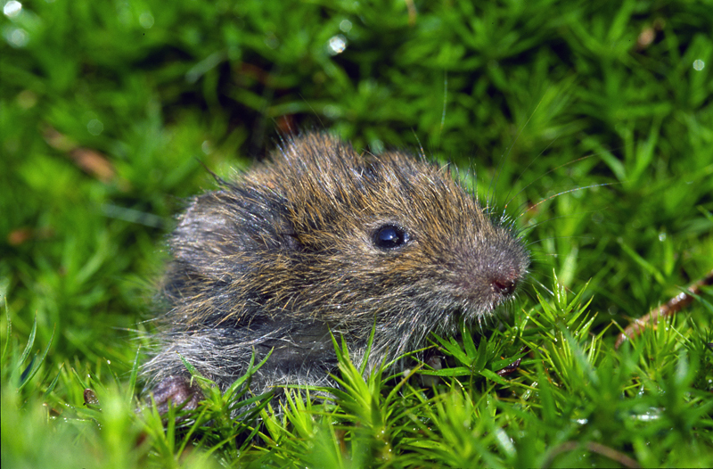 Zelfgemaakte opname van aardmuis (Microtus agrestis). Opname in Kaapse Bossen, prov. Utrecht.